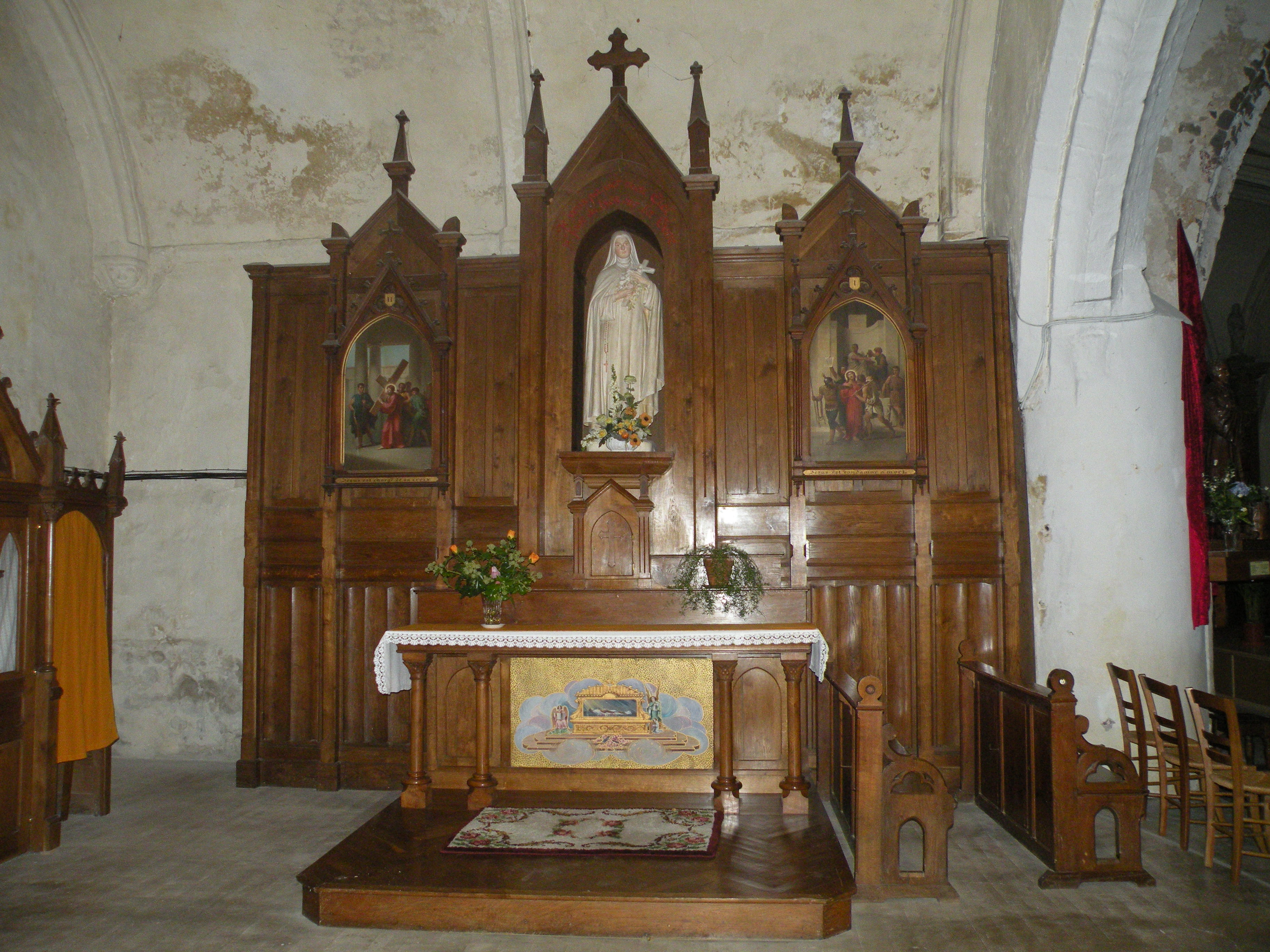 Église Sainte-Radegonde de Talmont-Saint-Hilaire 1